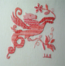 Artesania de Garcibuey, imagen propia